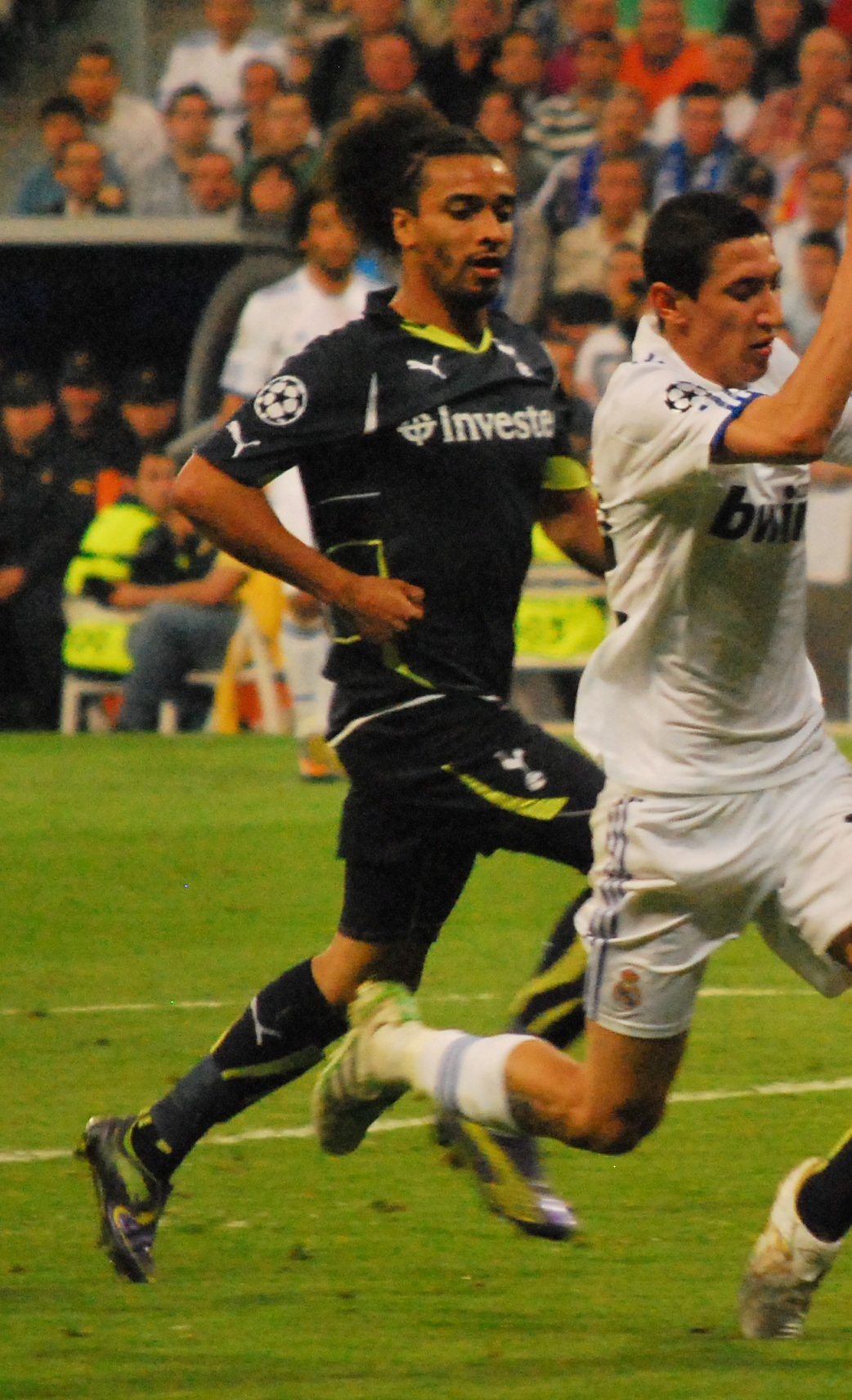 Benoît Assou-Ekotto derrière Angel Di Mari du Real Madrid